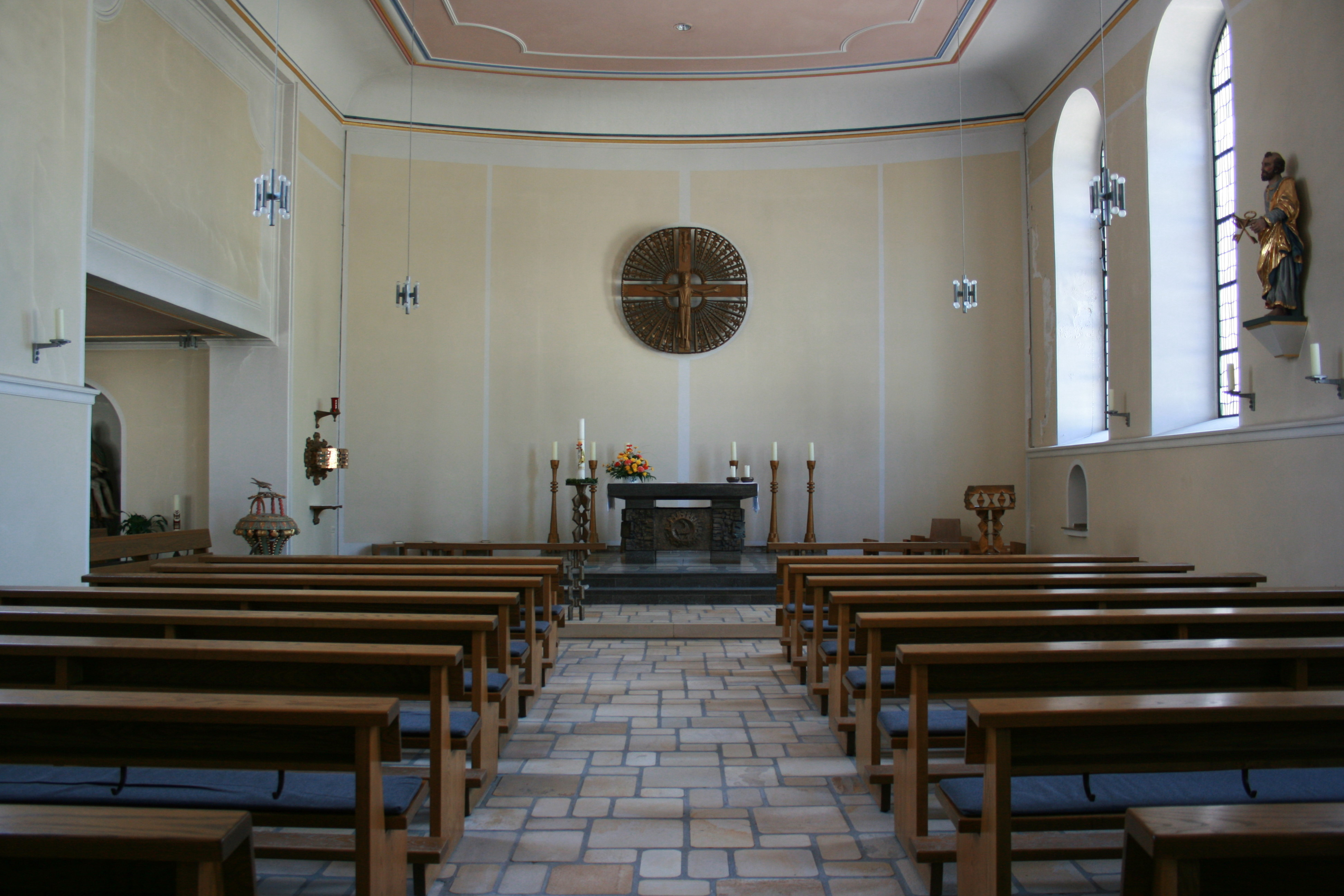 Katholische Kirche St. Jakobus in Breckerfeld